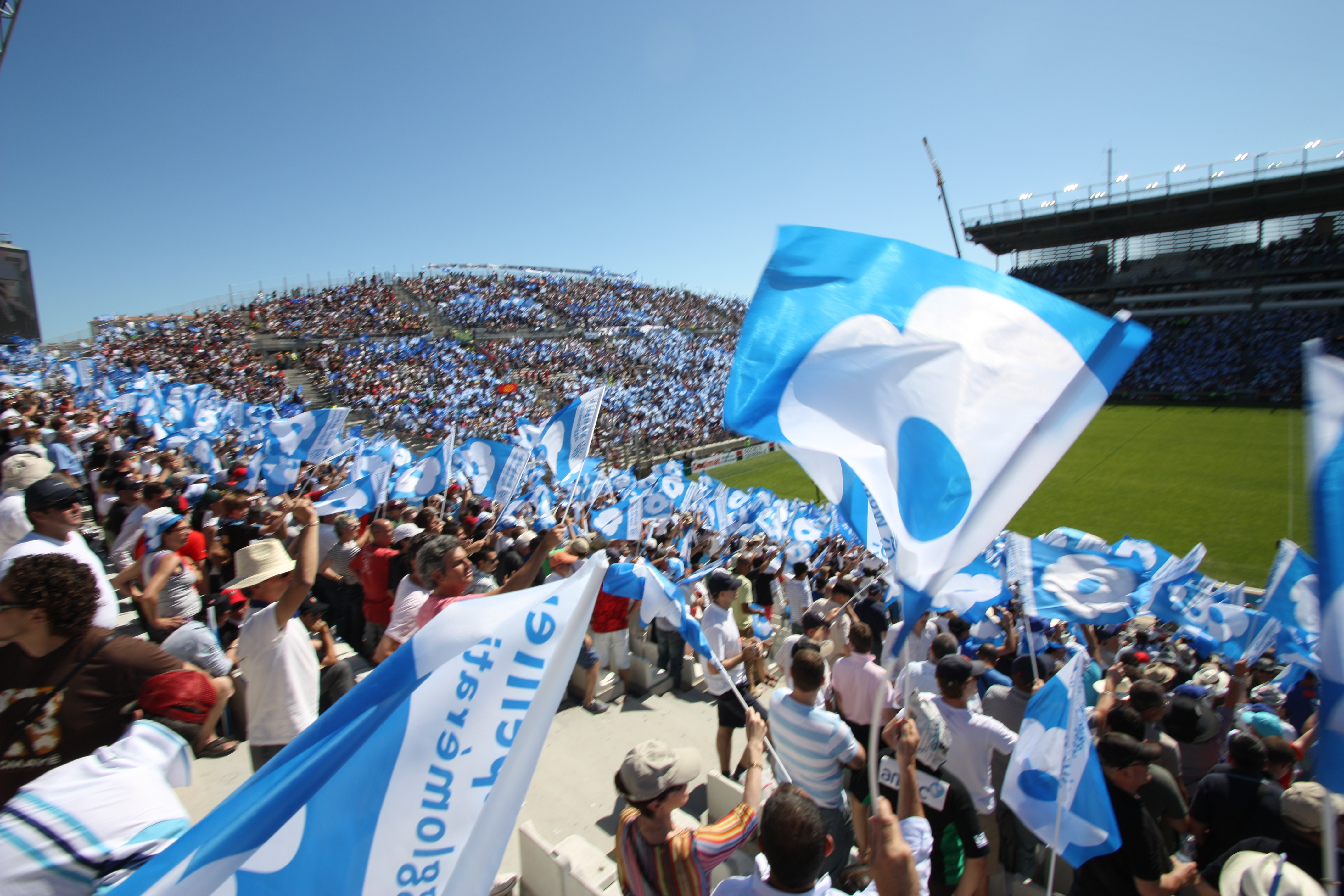 Top14 - 1/2 Finale - Racing Métro 92 - Montpellier